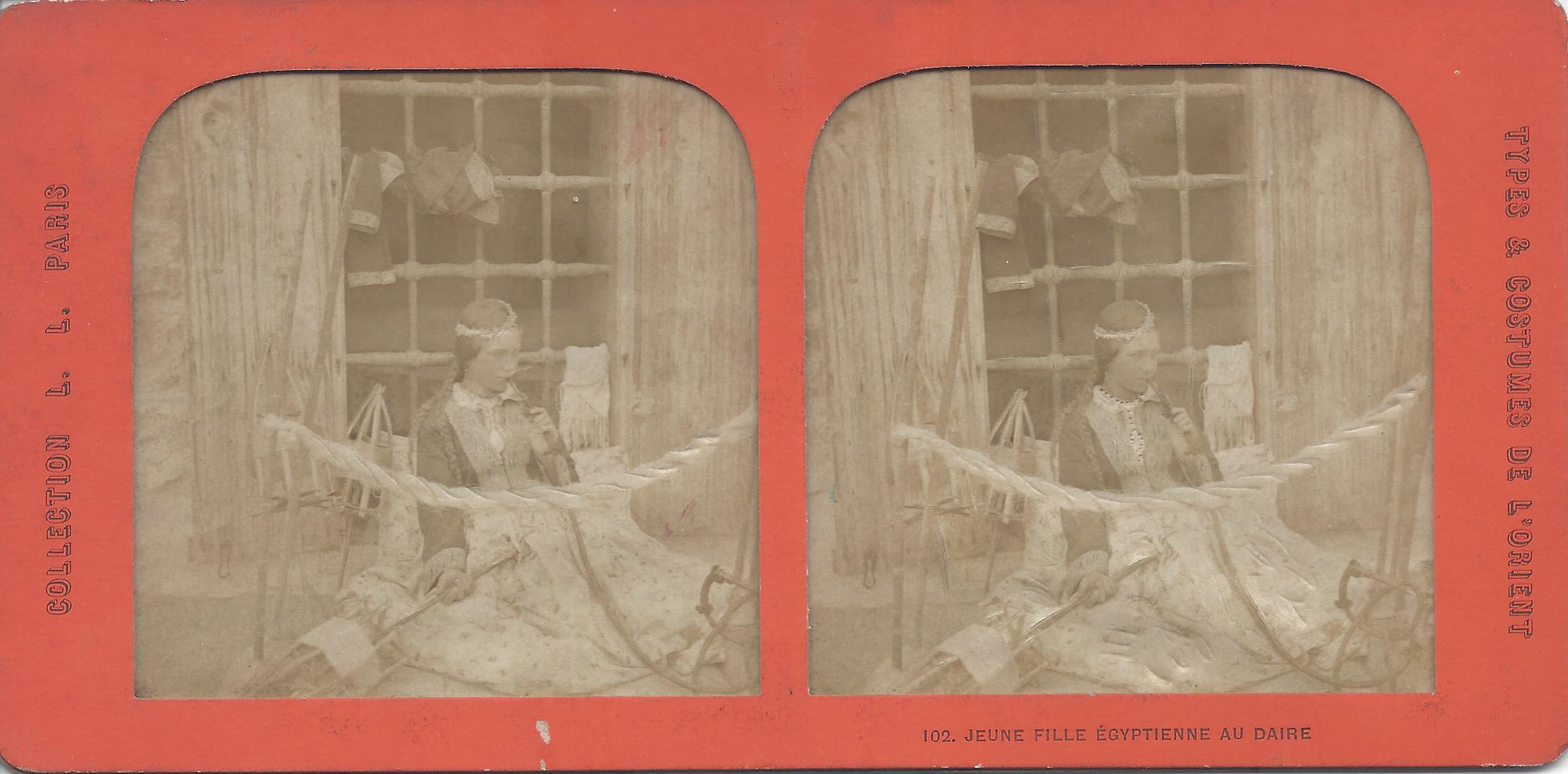 Ludovico Wolfgang Hart: Maronitin aus Zūq al Kabīr beim Seidenweben, fälschlich auf Stereokarte der Collection Levy & Leon als Ägypterin bezeichnet, um 1870, transparenter Albuinabzug mit rückseitiger Kolorierung und Schlitzung.